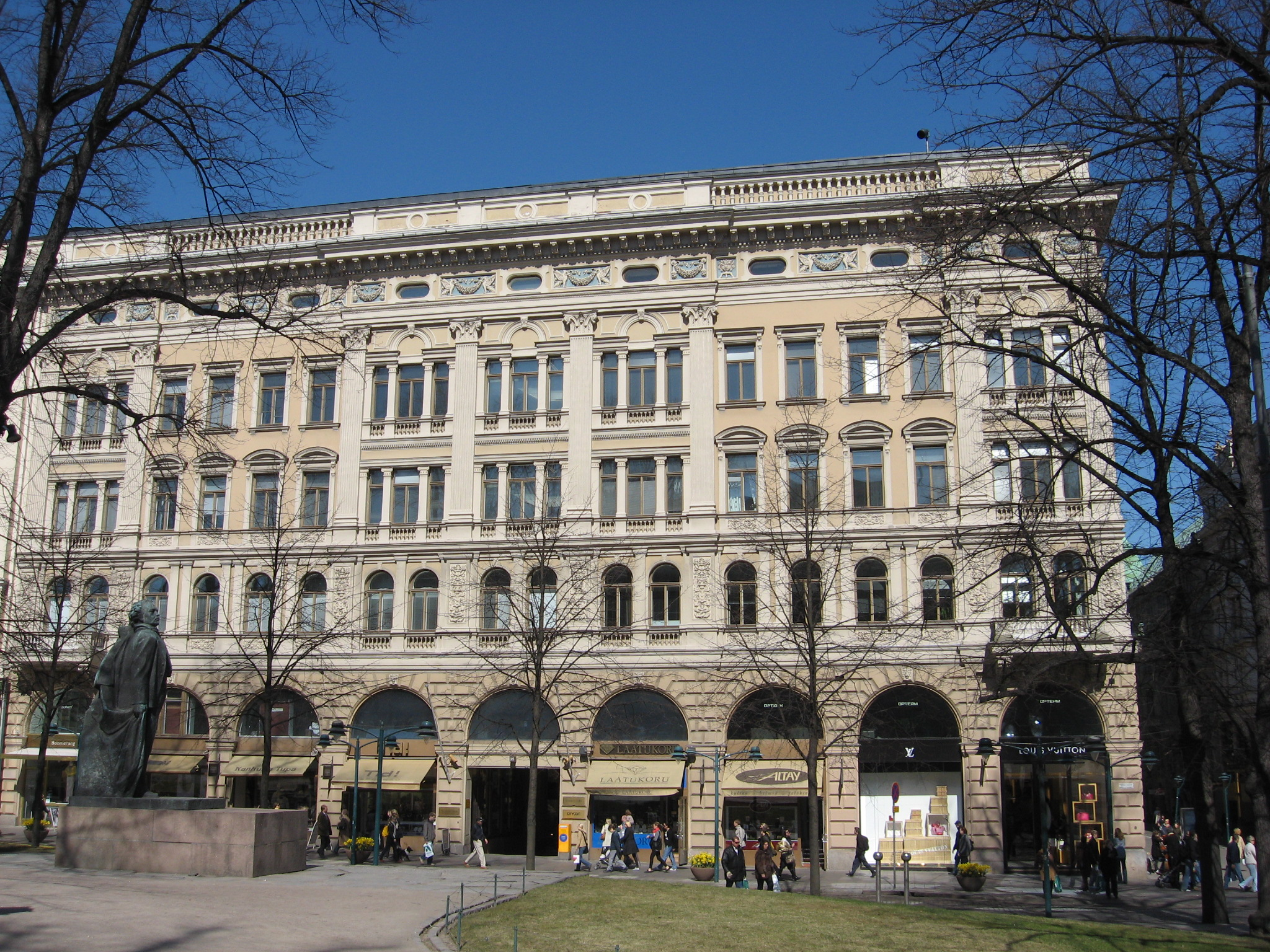 Pohjoisesplanadi 35, Helsinki. Rakennus on valmistunut vuonna 1888, ja sen on suunnitellut arkkitehti Karl August Wrede.